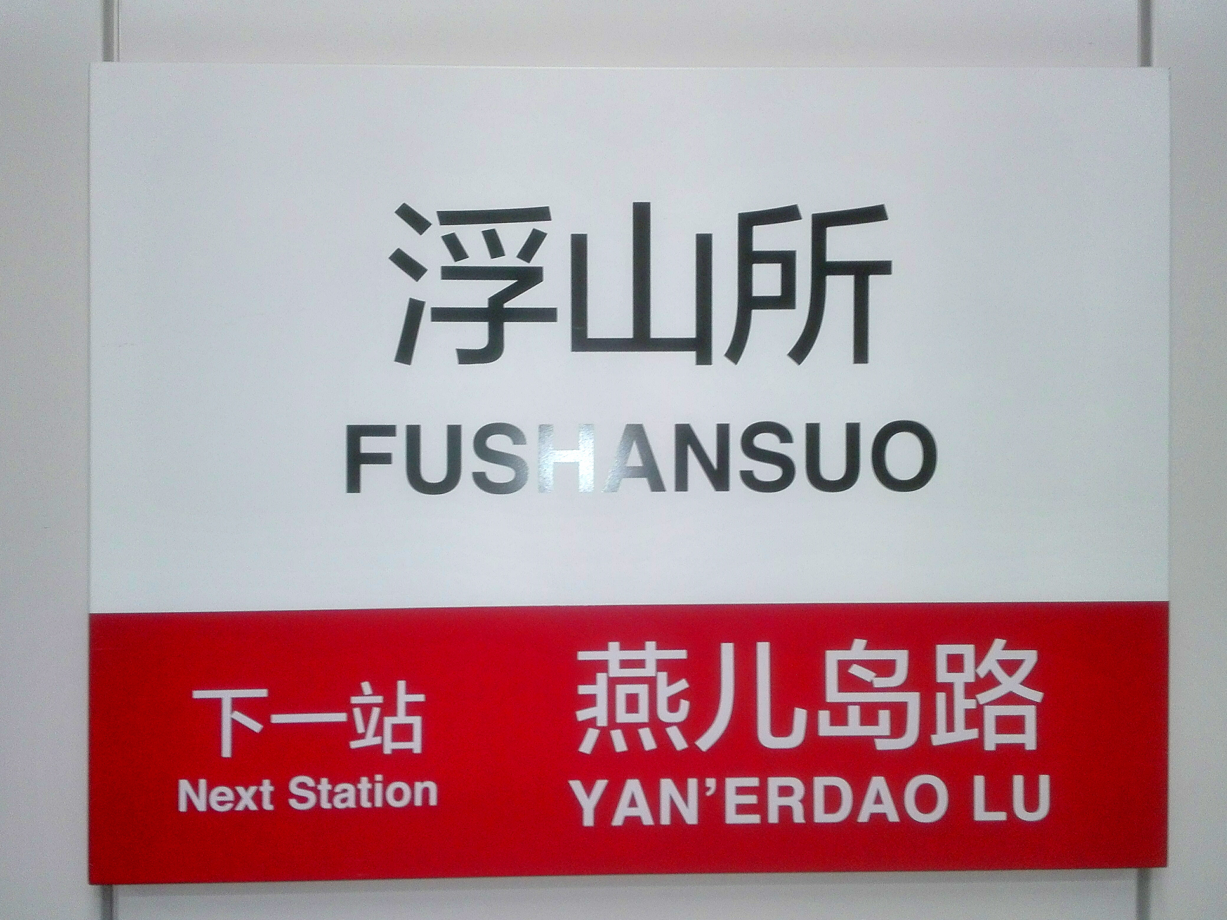 青岛地铁二号线浮山所站站牌